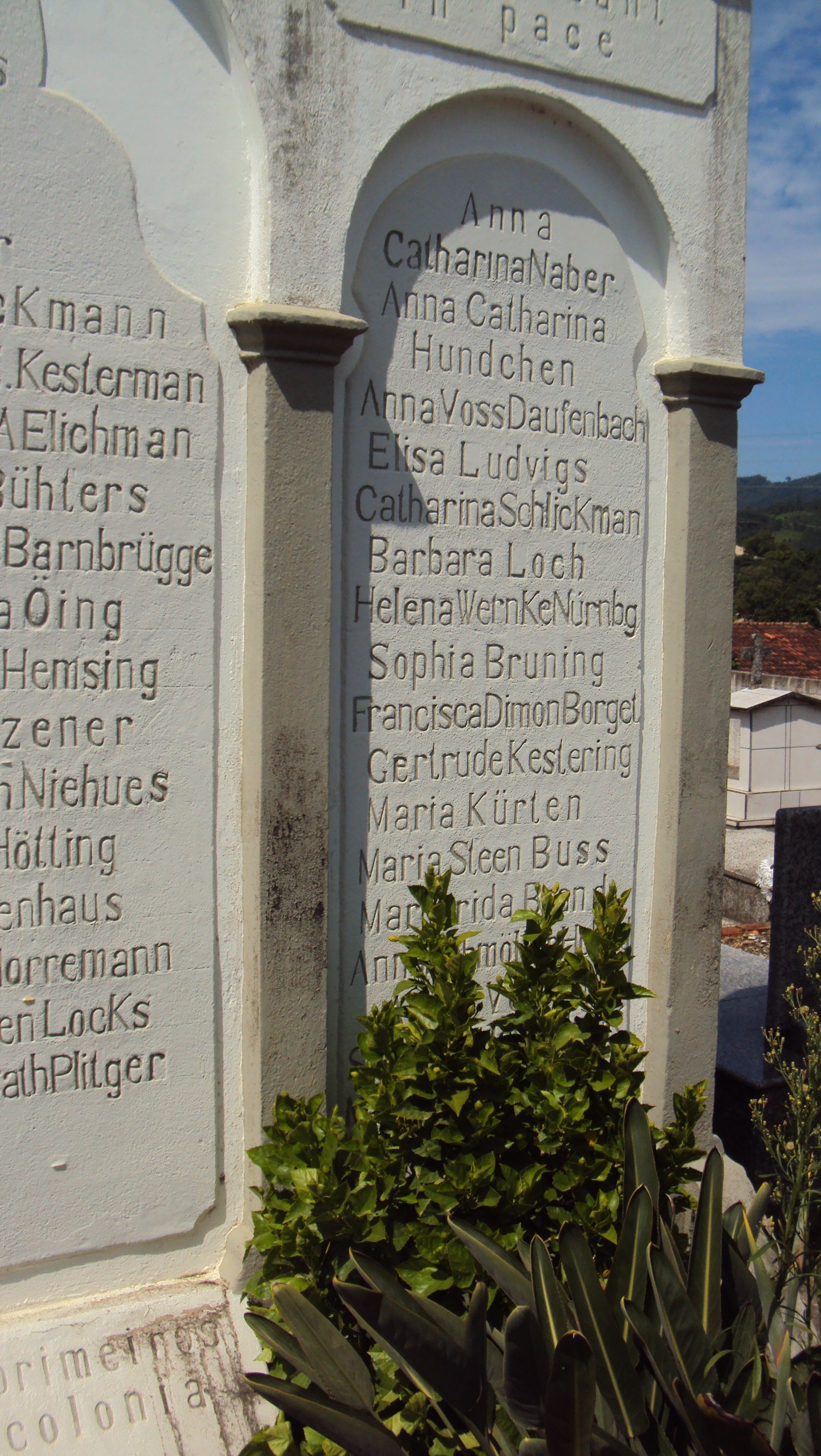 Sepultura coletiva dos imigrantes fundadores da colônia de Braço do Norte